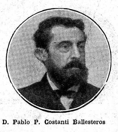 Pablo Pérez Costanti, foto en Vida Gallega, 1910